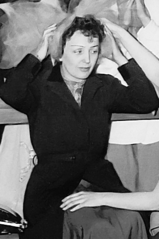 La P'tite Lili Ketty Albertini avec, entre autres, Edith Piaf - Théâtre de l'ABC